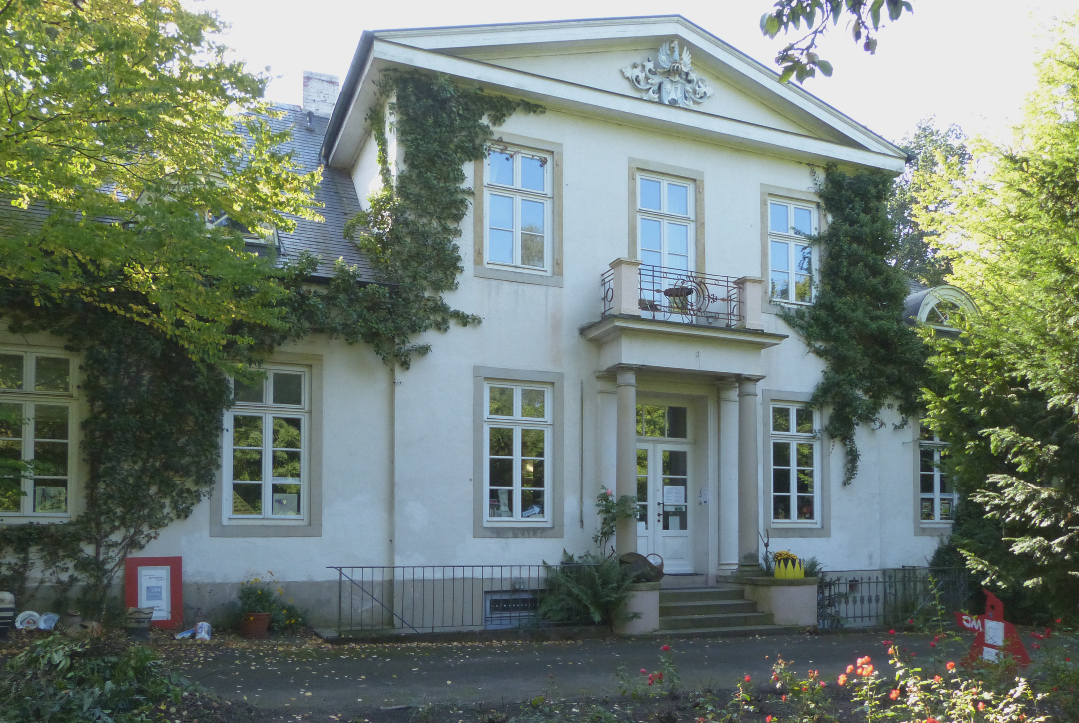 Heinrichsburg, Haus Lesmona in Bremen, Am Kapellenberg 5; NordseiteDas abgebildete Objekt ist ein geschütztes Kulturdenkmal in der Freien Hansestadt Bremen, mit der Nr. 1249 beim Landesamt für Denkmalpflege registriert.